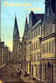 Minna Rüdiger: Unvergessenes (Buchcover)